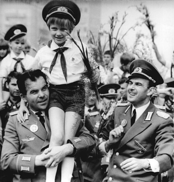 Berlin, 10. Weltfestspiel, Demonstration ADN-ZB Sindermann 15.8.73 Berlin:X.Weltfestspiele (28.7.-5.8.73) -Voller Stolz demonstrierten diese Jungpioniere auf den Schultern von NVA-Offizieren am Tag der DDR-Jugend.(4.8.73)